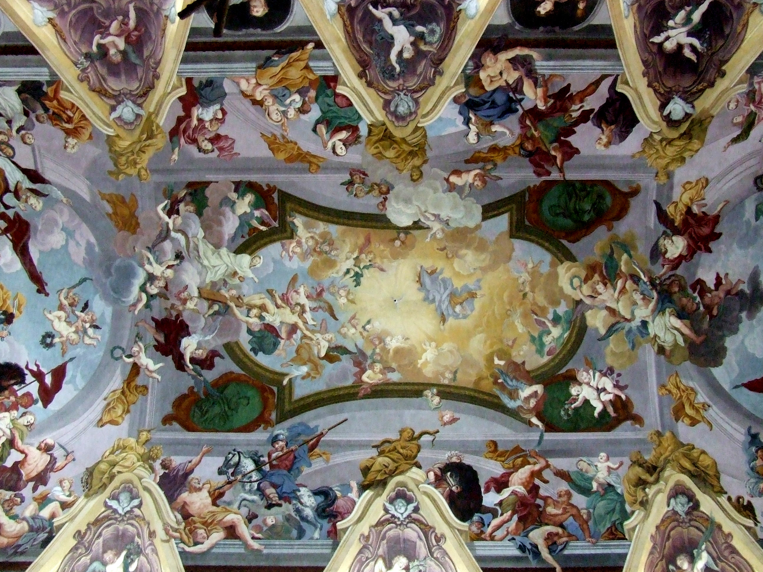 slika prikazuje pred kratkim obnovljen (restavratorsko) strop - obok ljubljanske Stolnice, delo baročnega mojstra G. Quaglia. Iluzinistično slikarstvo.